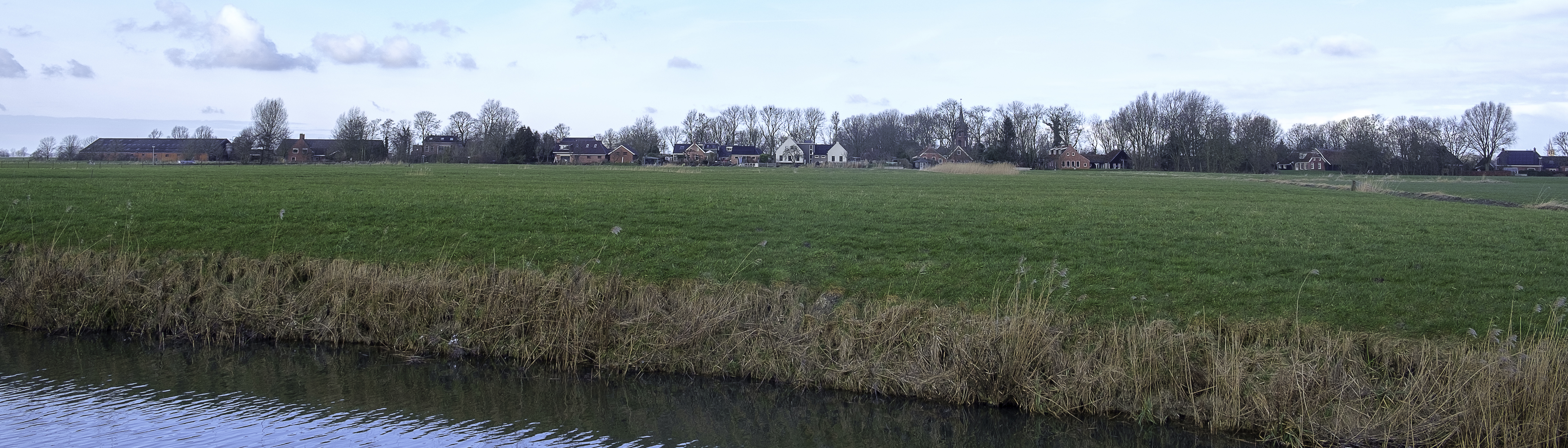 Silhouet van Toornwerd